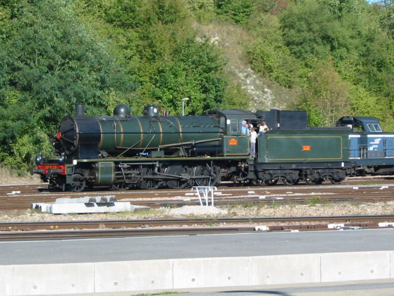 La 140 C 231 de l'Ajecta lors des journées du Patrimoine 2004.